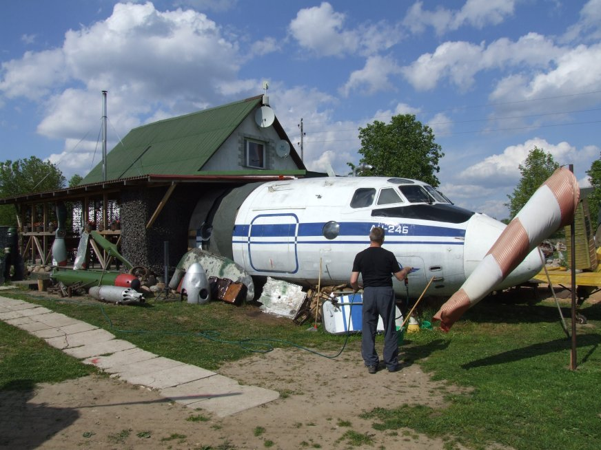 Kafejnīca "Dakota", 17.05.2008.